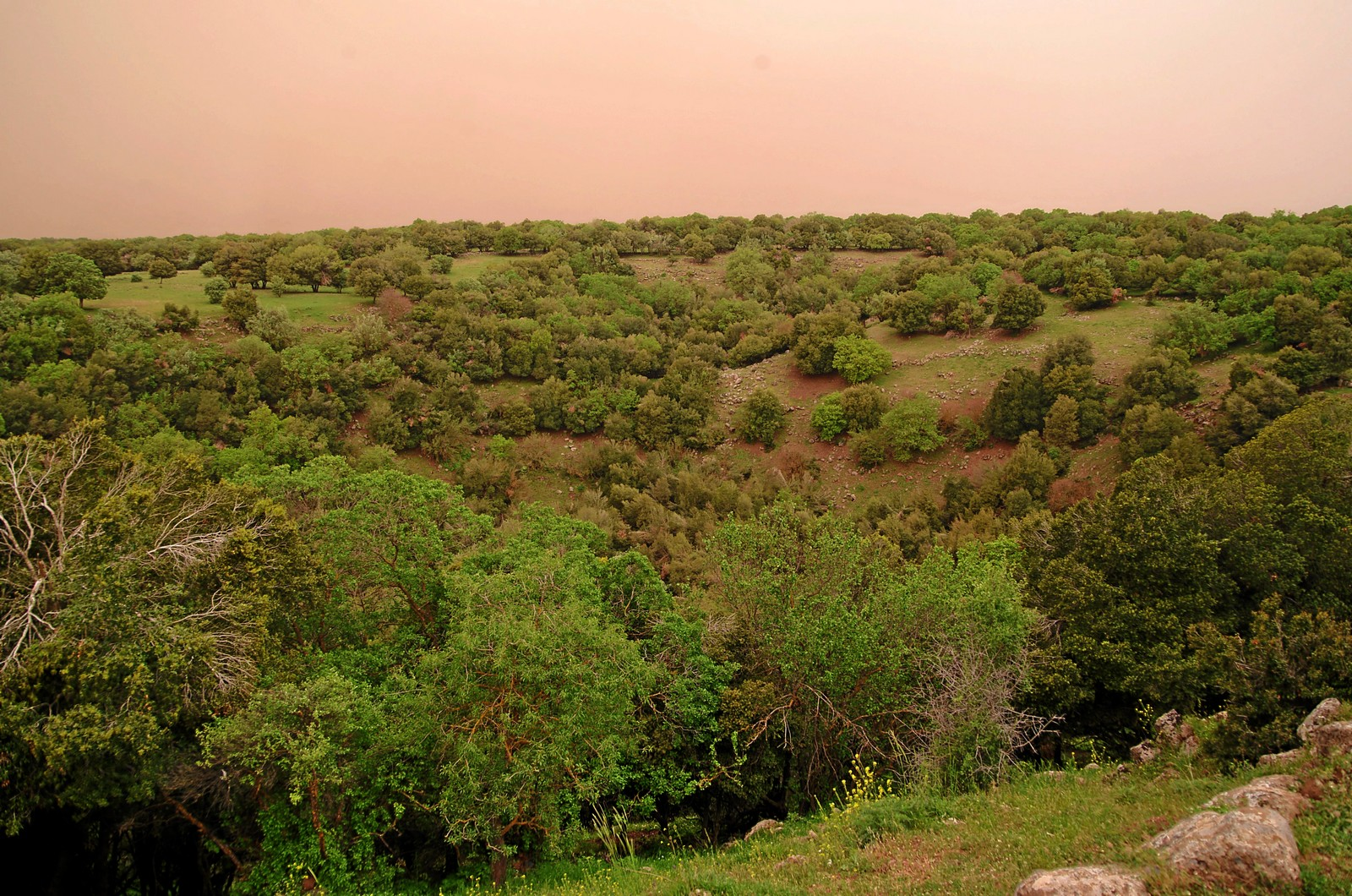 Golan Odem Forest Reserve: Big Juba